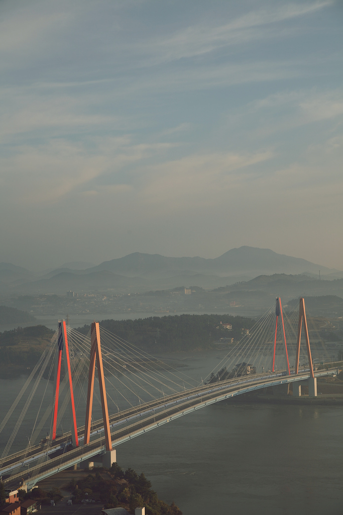 진도대교의 아침